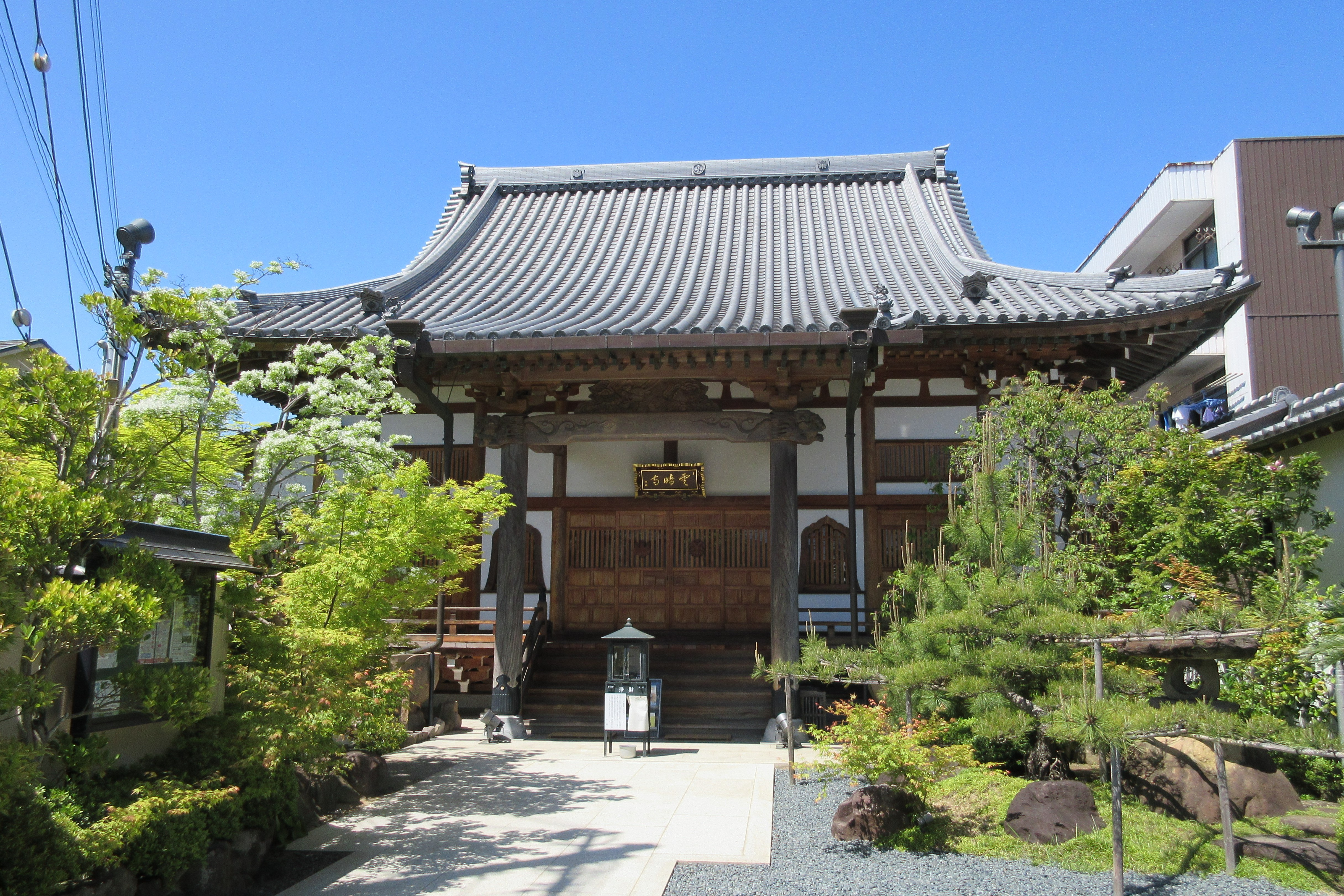 雲晴寺本堂